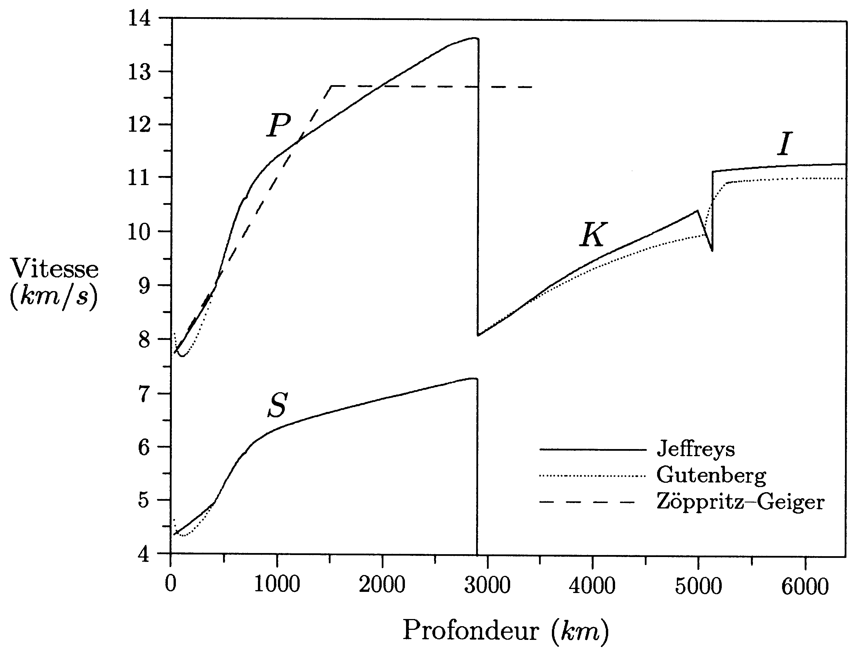 Courbes de vitesse historiques.